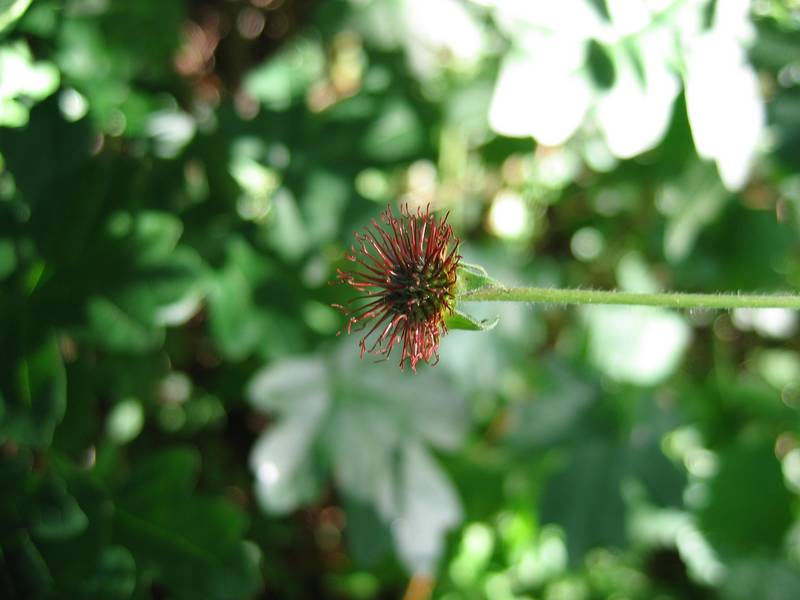 Klettenfrucht einer Echten Nelkenwurz Geum urbanum